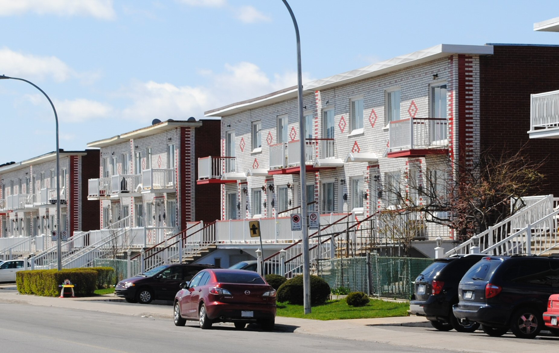 Maisons en rangée sur la rue Jarry dans Saint-Léonard.